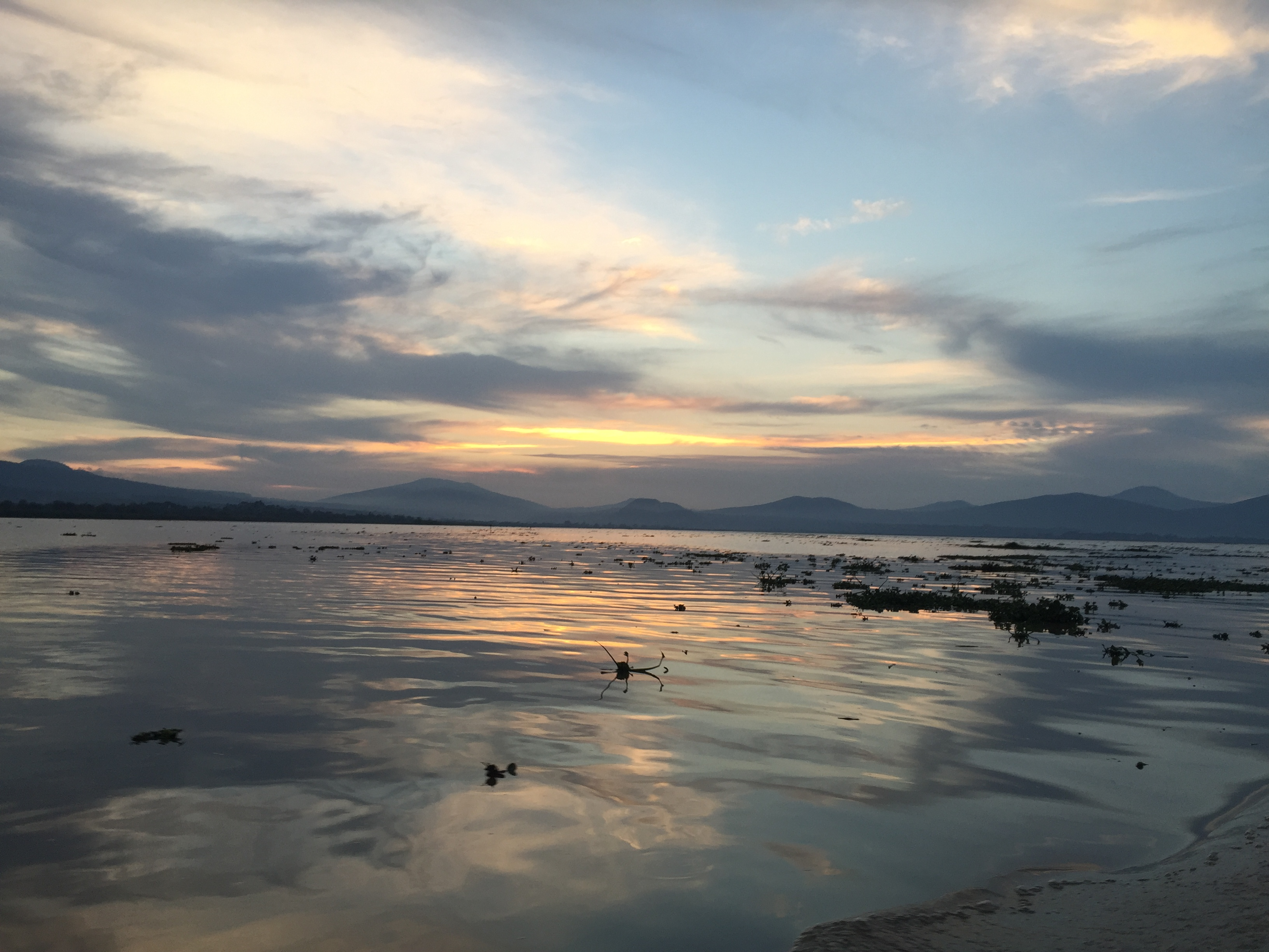 Atardecer visto desde una de las lanchas en las que se viaja a la isla de Janitzio